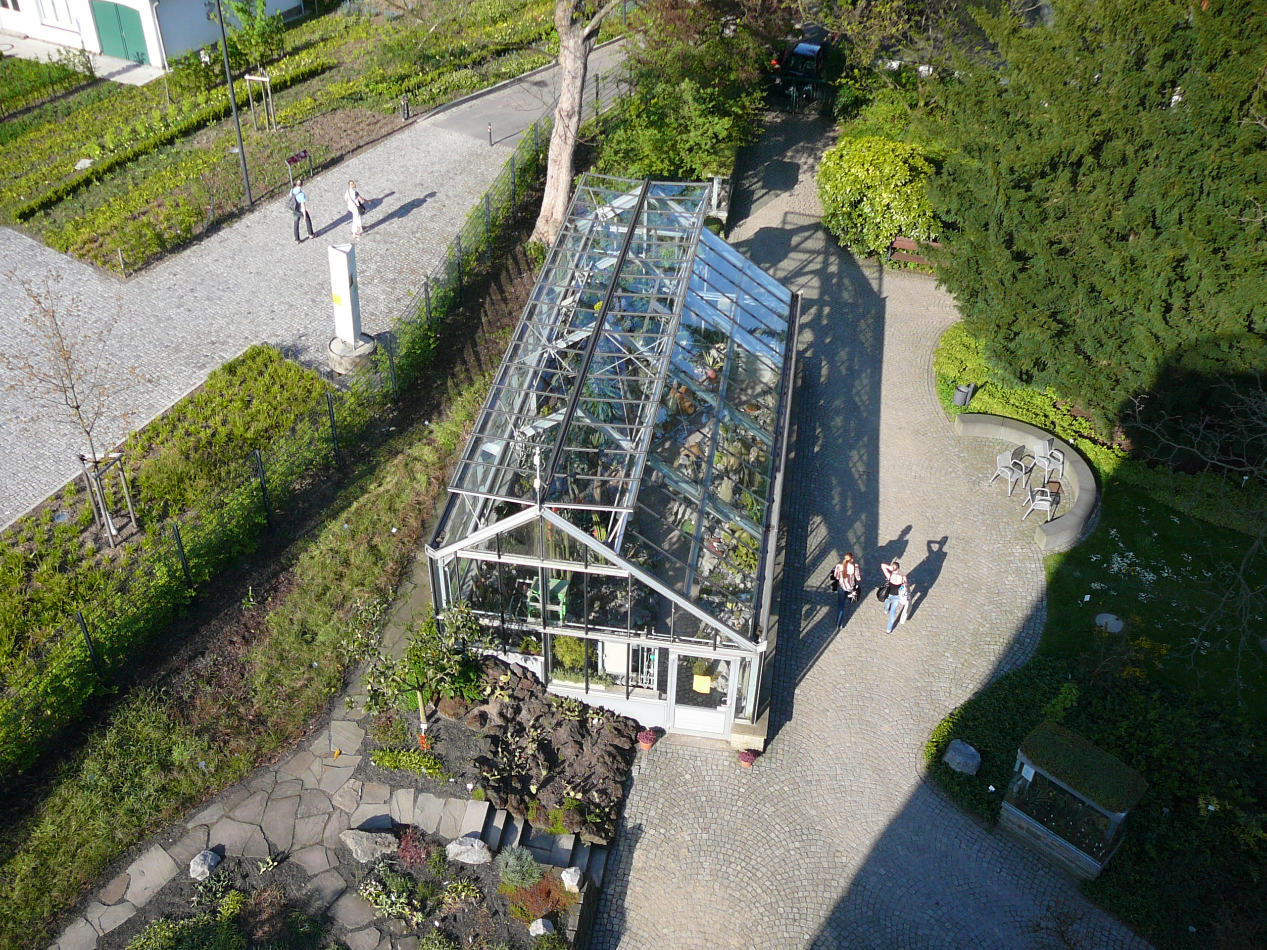 Hardt-Anlagen, Wuppertal